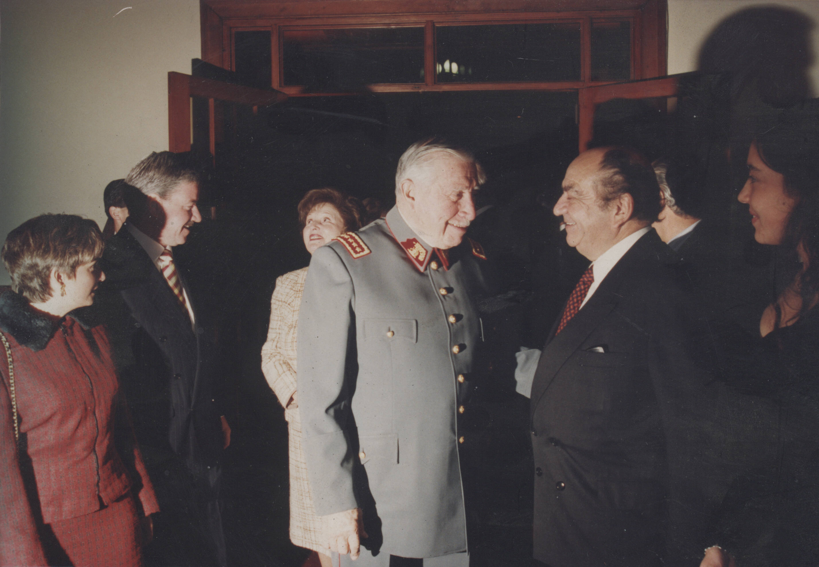 Mario Arnello junto a Augusto Pinochet Ugarte.